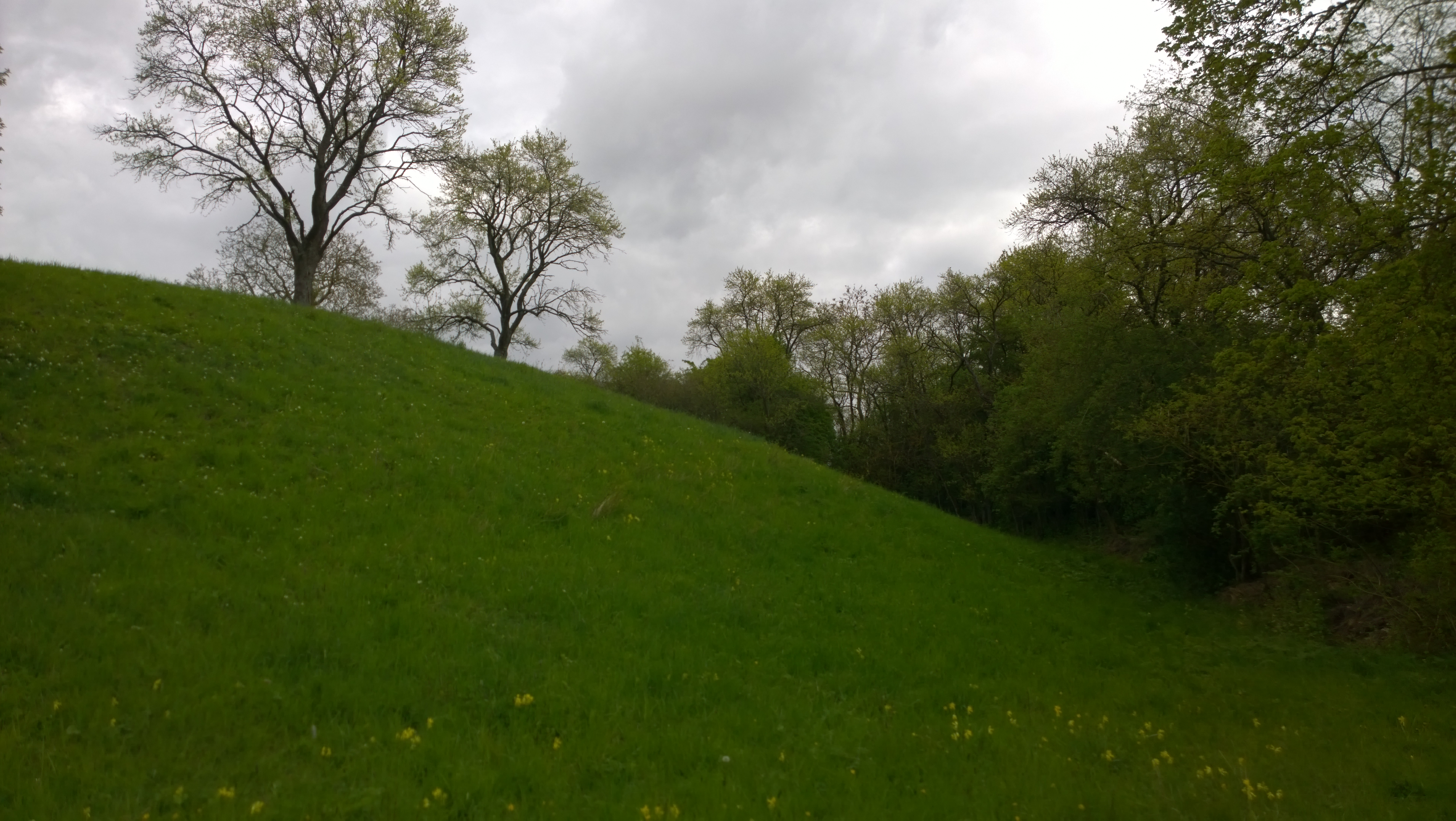 Burgstall Erbshausen: Blick von der kleinen südwestlichen Terasse auf Türmhügel und Burggraben